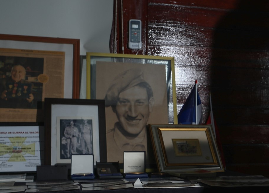 Jorge Sanjinez Lenz, retratos y medallas de su participación en la Segunda Guerra Mundial en Europa.